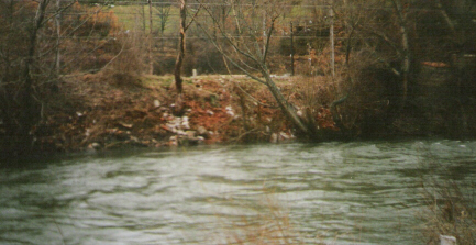 Bernesga River near La Pola de Gordón, Leon, Spain. Río Bernesga a su paso por La Pola de Gordón (León)/Bernesga River at the heigth of La Pola de Gordón, León, Spain